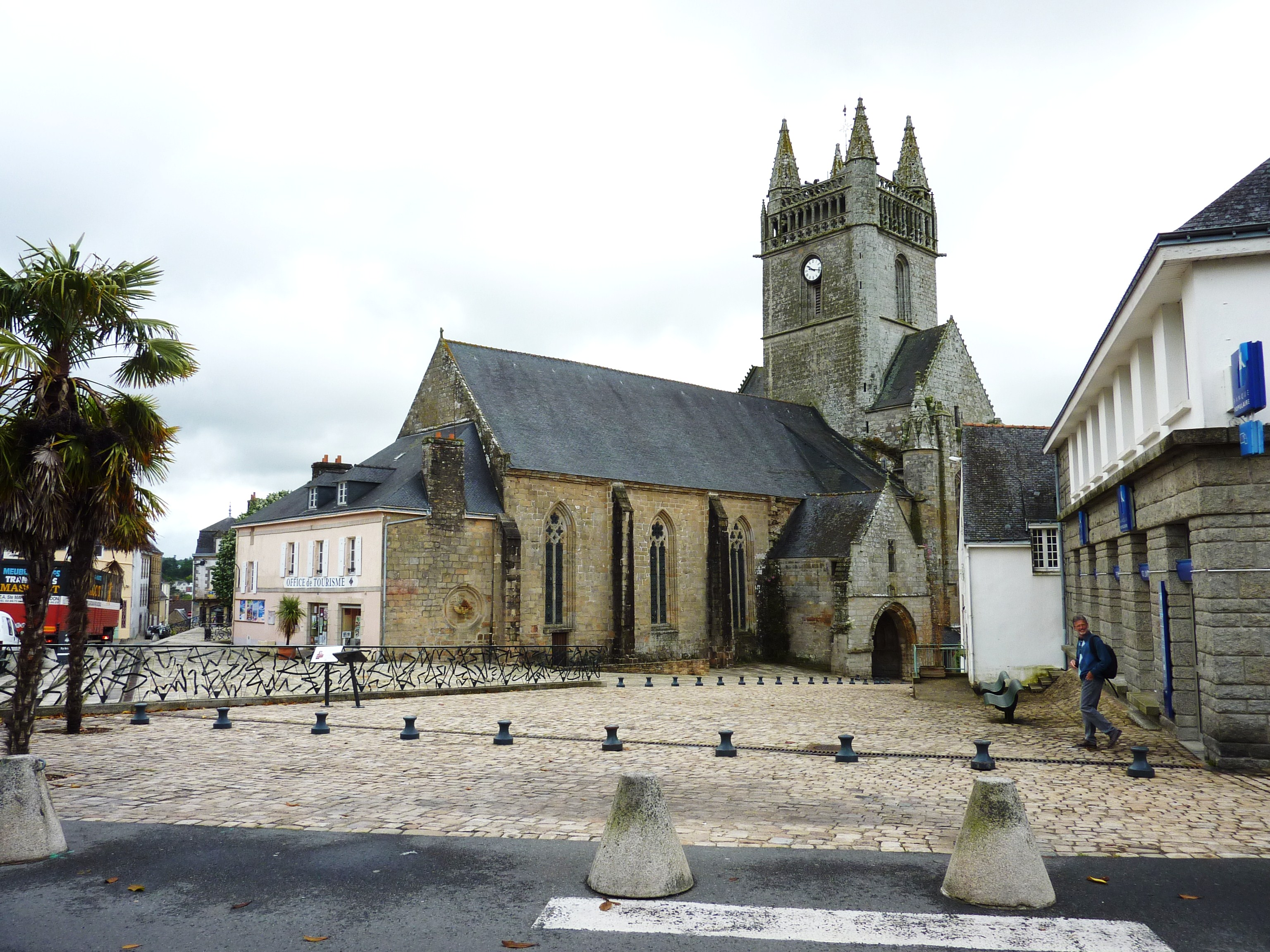 Quimperlé Eglise Notre-dame de l'Assomption Place Saint-Michel [ville haute]